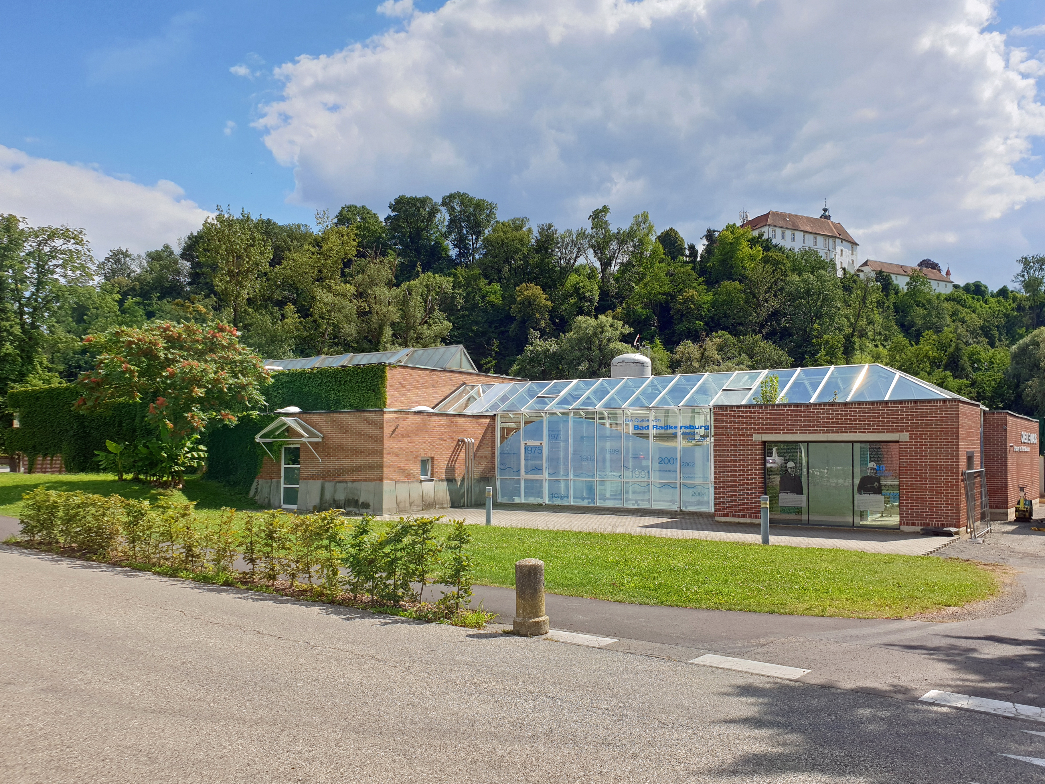 Quellenhaus in Bad Radkersburg, im Hintergrund Schloss Oberradkersburg.